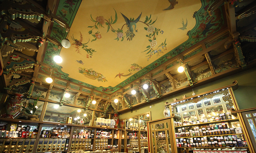 Потолок Чайного дома Перлова после реставрации